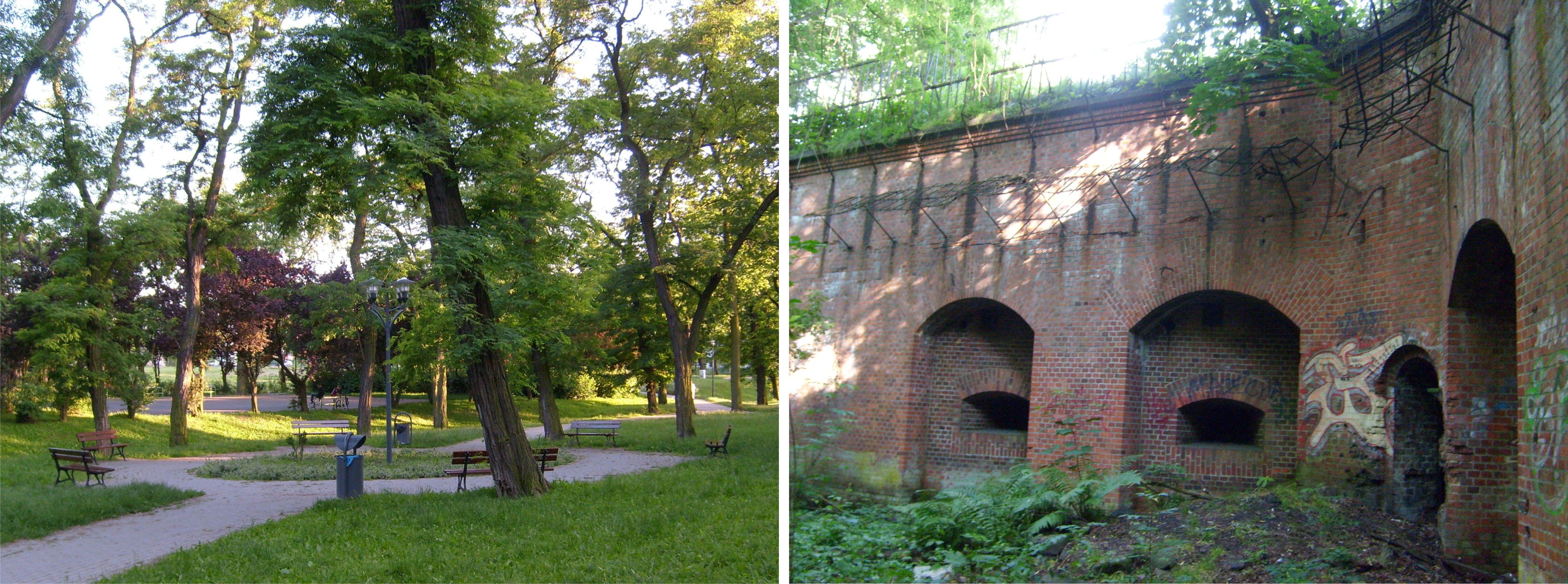 Osiedle Raszyn w Poznaniu - park i fort